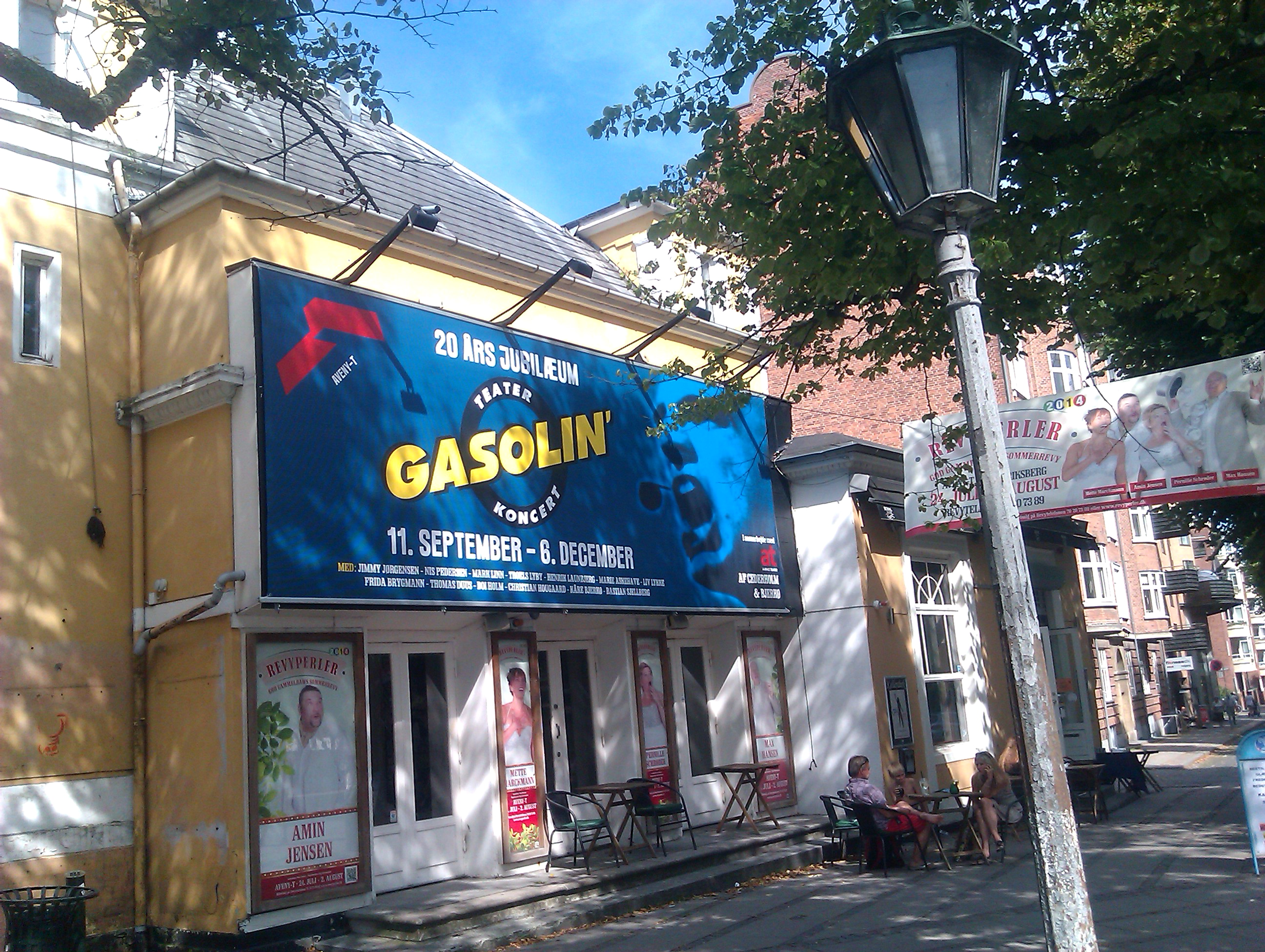 Teater Aveny T, Frederiksberg